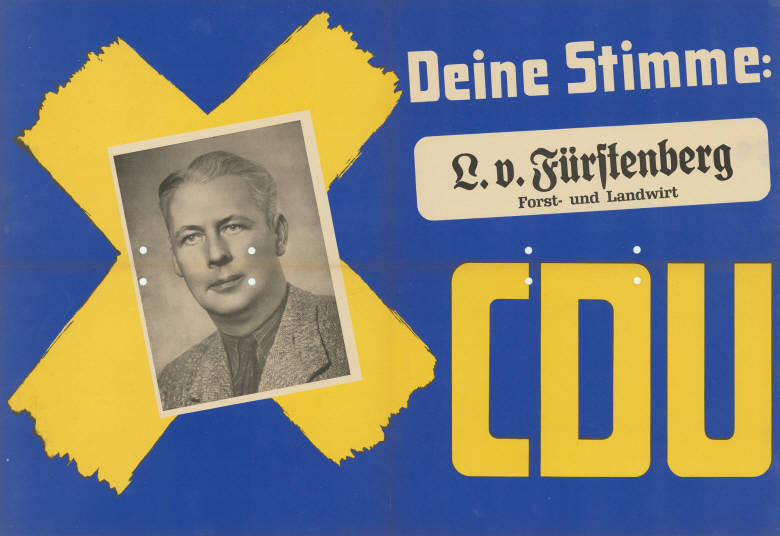 Deine Stimme: L. v. Fürstenberg Forst- und Landwirt CDU Abbildung: Porträtfoto - Stimmkreuz Plakatart: Kandidaten-/Personenplakat mit Porträt Objekt-Signatur: 10-009 : 178 Bestand: Landtagswahlplakate Nordrhein-Westfalen (10-009) GliederungBestand10-18: Landtagswahlplakate Nordrhein-Westfalen (10-009) » Landtagswahl am 18.6.1950 » CDU » mit Porträtfoto Lizenz: KAS/ACDP 10-009 : 178 CC-BY-SA 3.0 DE